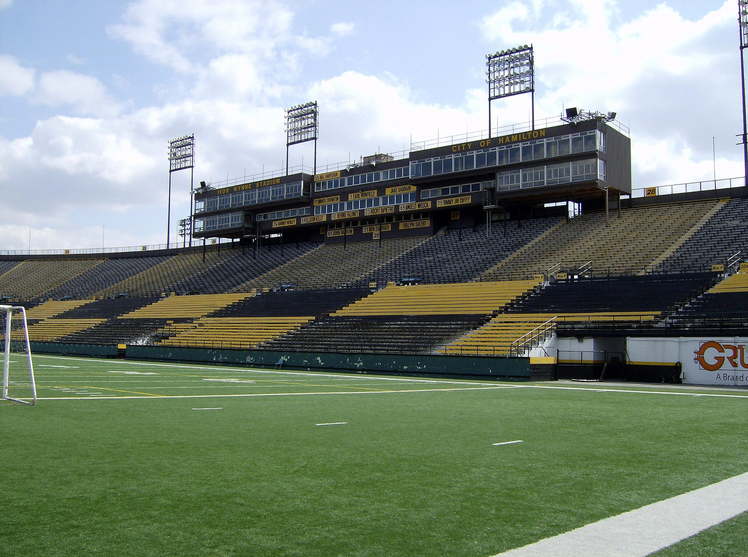 self made